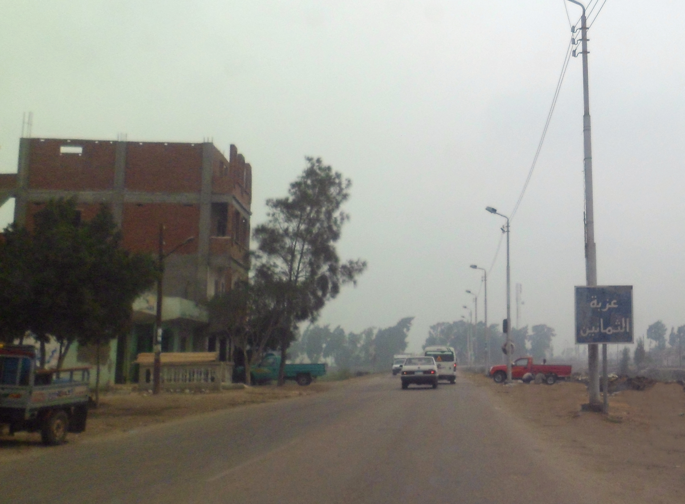 عزبة الثمانين، مركز دسوق